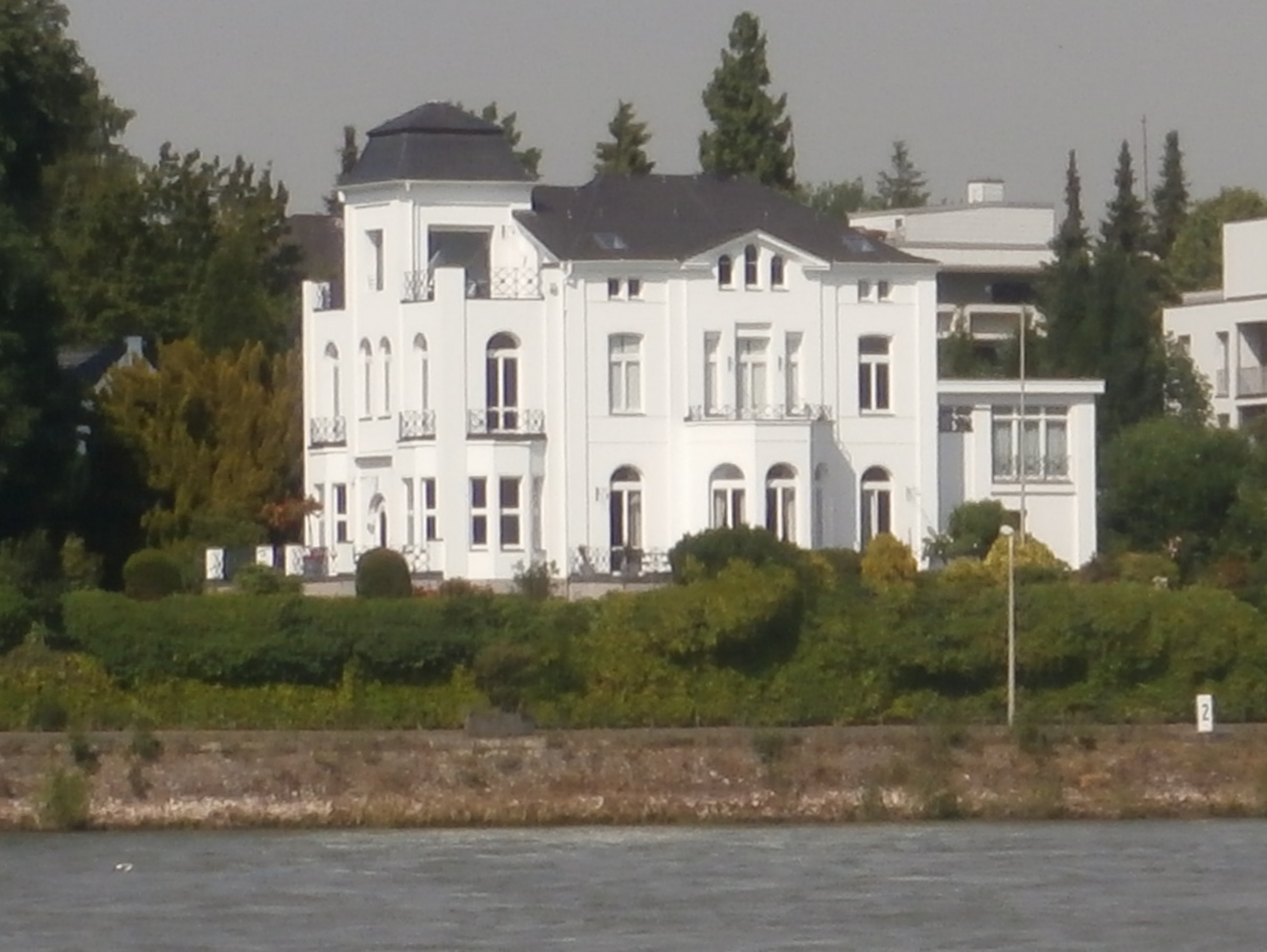 Villa Cleff, Dollendorfer Straße 15, Bad Godesberg